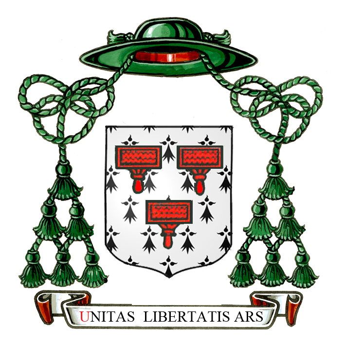 Wapenschild van Frans van der Burch